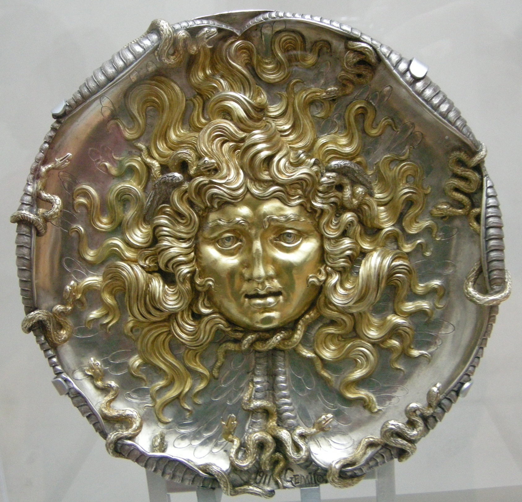 Vincenzo gemito, medusa, 1911